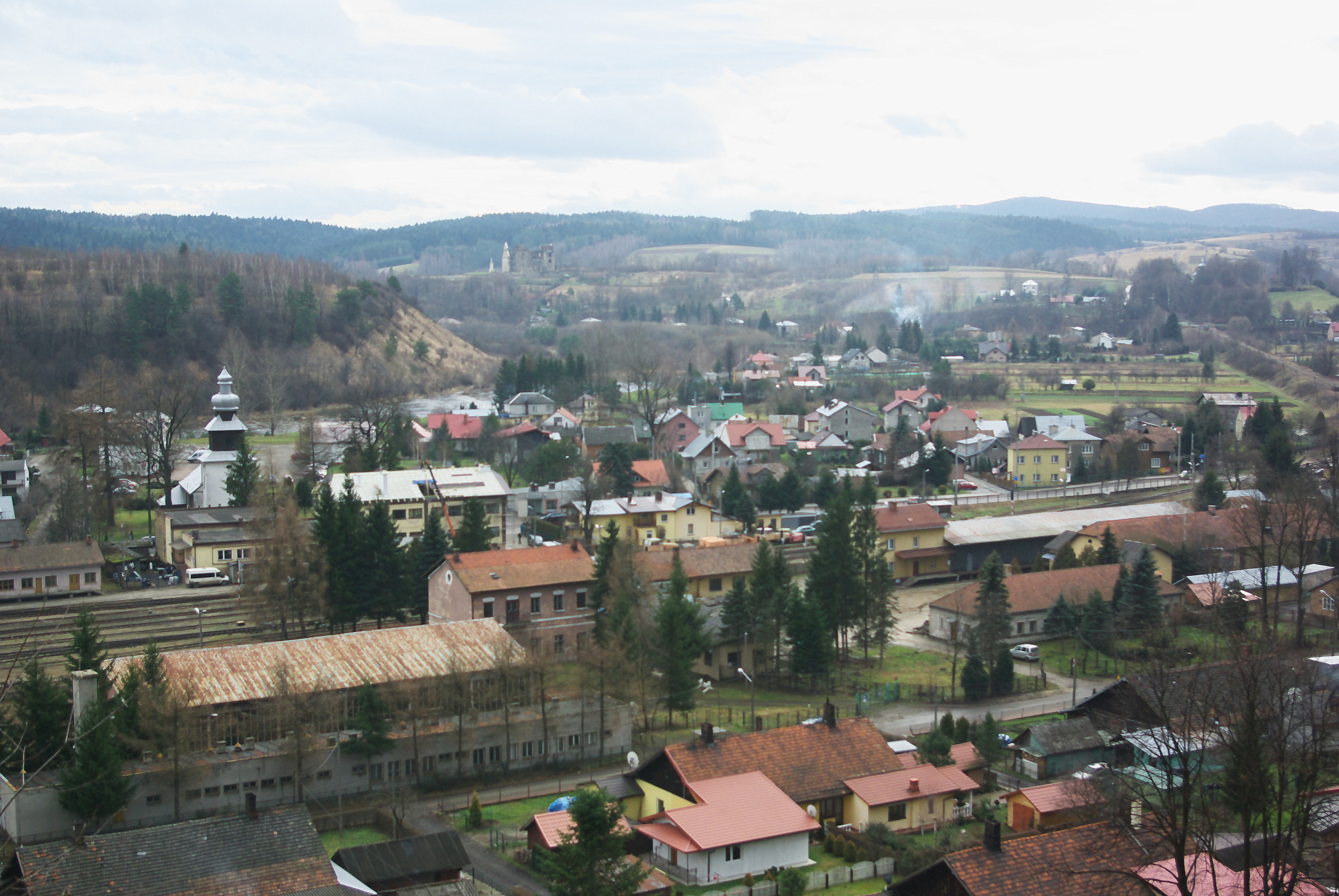 Panorama Zagórza